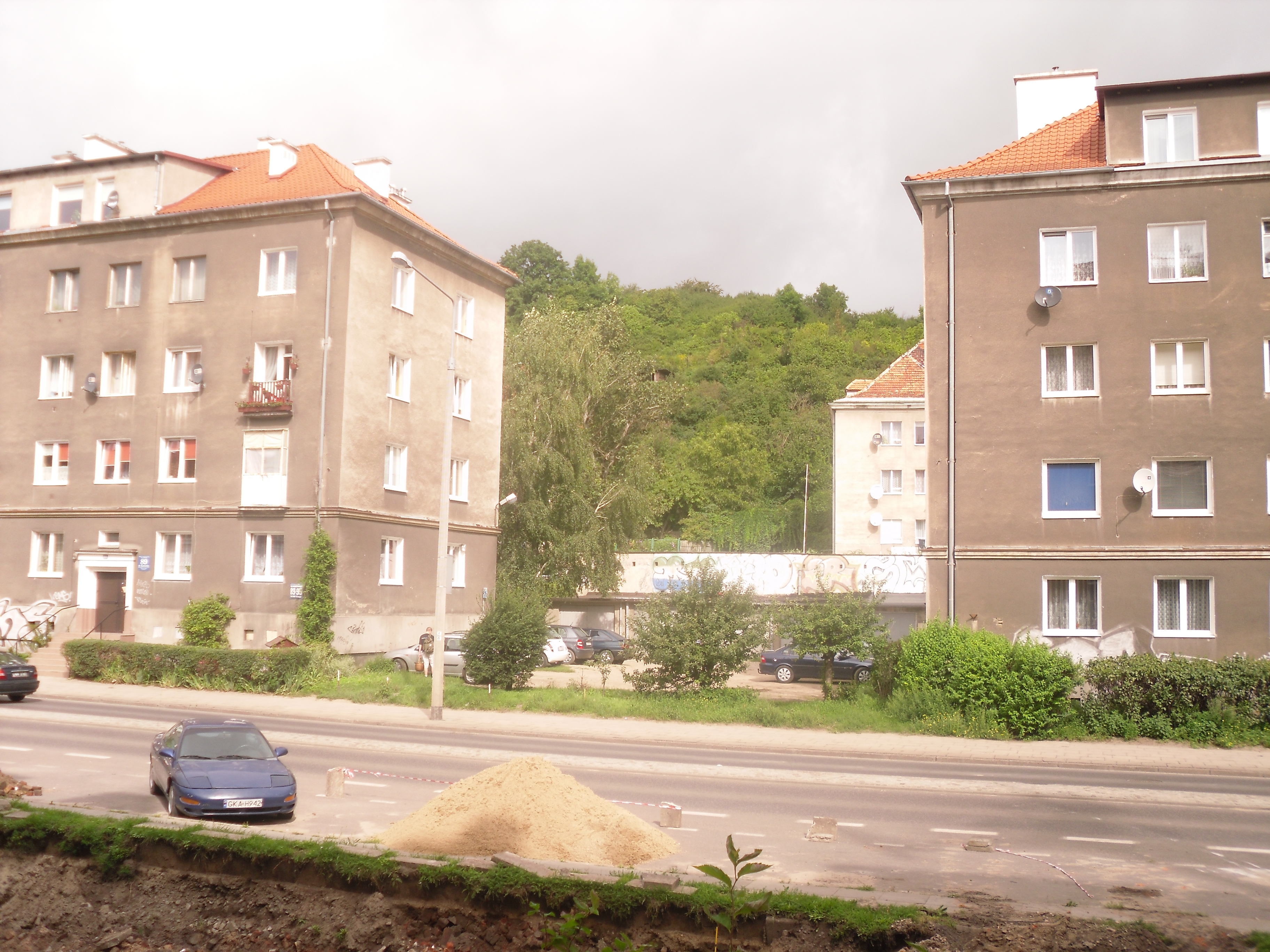 Siedlce, widok w kierunku Suchanina.